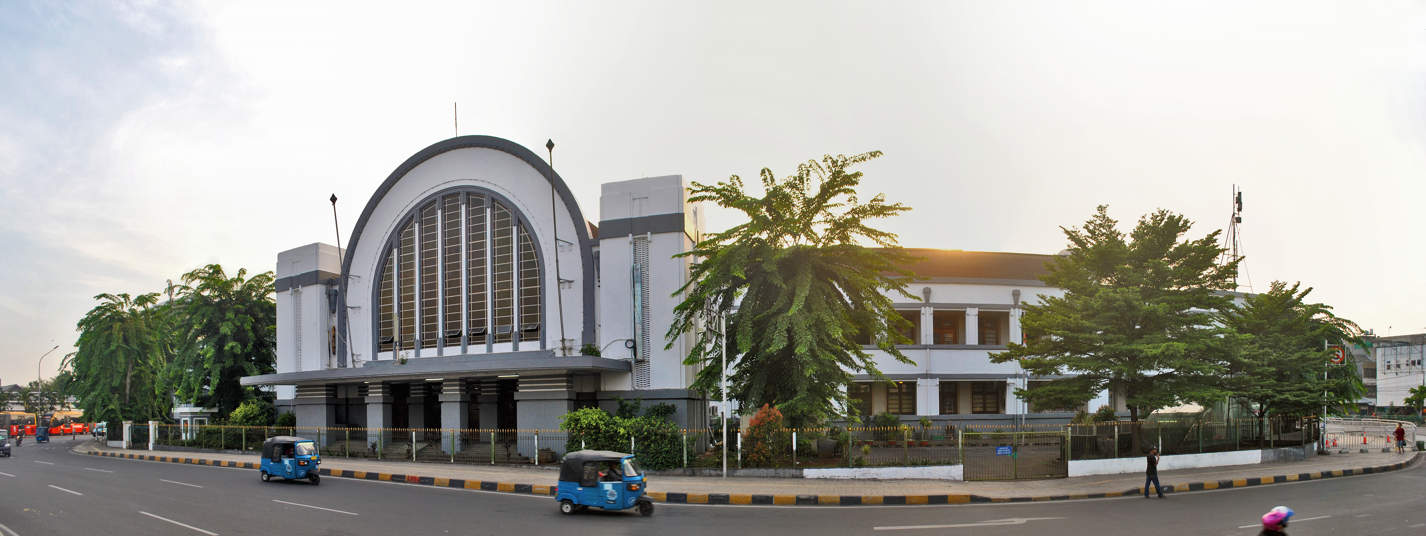 Jakarta's north central railway station, mostly serves commuter railway and some local trains. This current building was built in 1926-1929 and designed by Dutch architect Frans Johan Louwrens Ghijsels. The current renovation plan is "controversial", because "architecture preservationist" claimed addition of commercial precinct "ruined its beauty". Photographed from a TransJakarta bus stop. 7 images stitched using Hugin. Stasiun utama di kawasan Kota, Jakarta Utara, atau dikenal dengan Stasiun Beos, kini melayani kereta komuter dan kereta lokal. Gedung yang difoto saat ini digarap dari 1926 dan selesai pada 1929, dan didesain oleh arsitek kenamaan Belanda Frans Johan Louwrens Ghijsels. Rencana renovasi saat ini sangat "kontroversial" karena "pecinta arsitektur" memakan mentah-mentah arti dari preservasi arsitektur. Difoto dari stasiun bis TransJakarta 7 foto digabung menggunakan Hugin.